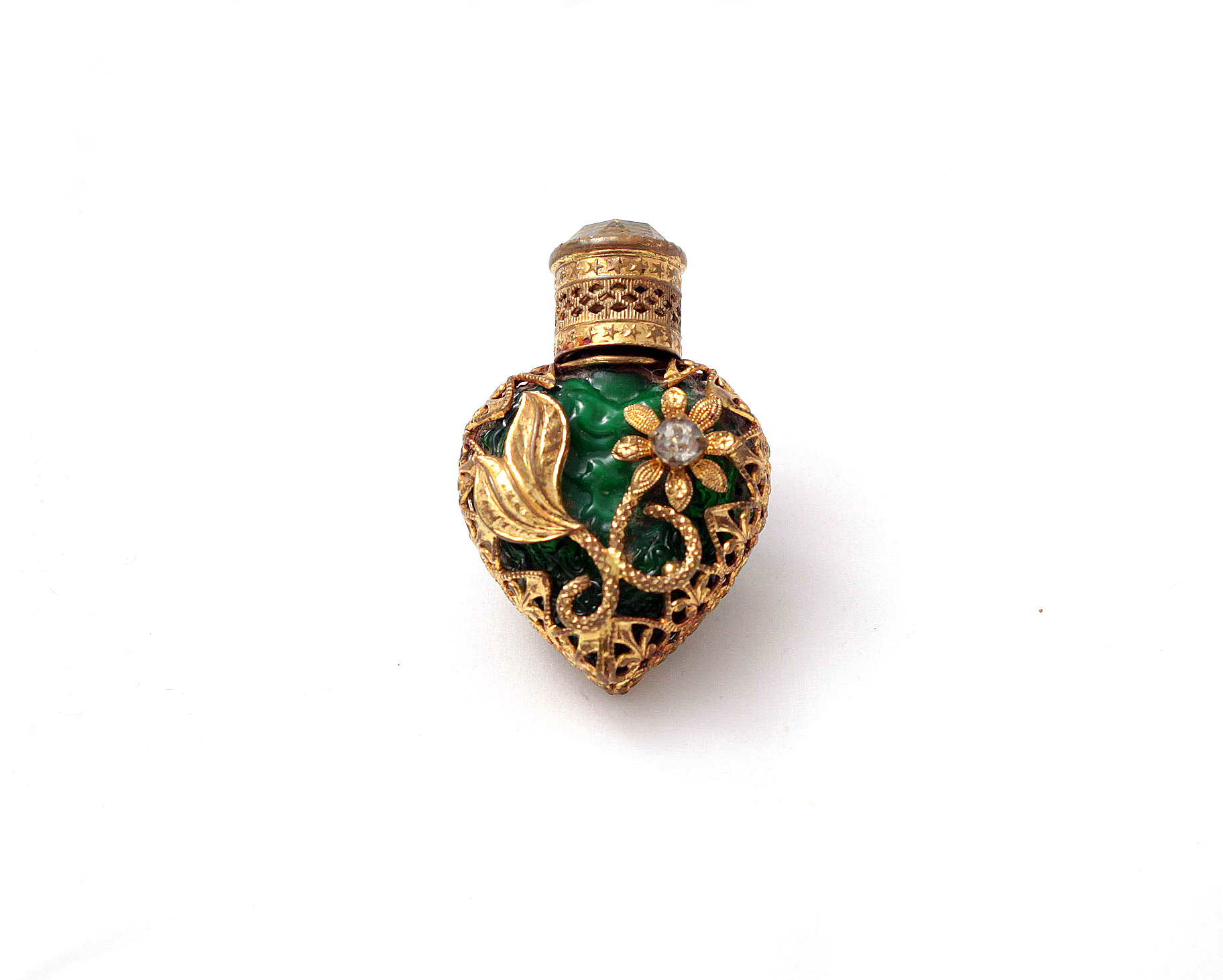 Acervo Museu da Imigração de São Paulo. República Tcheca, sem data. Vidro, metal. Doação Marie Hlavacek. Frasco em vidro na cor verde em formato de coração envolto por estrutura metálica vazada de motivos florais, provida de tampa em metal encimada por pedra.